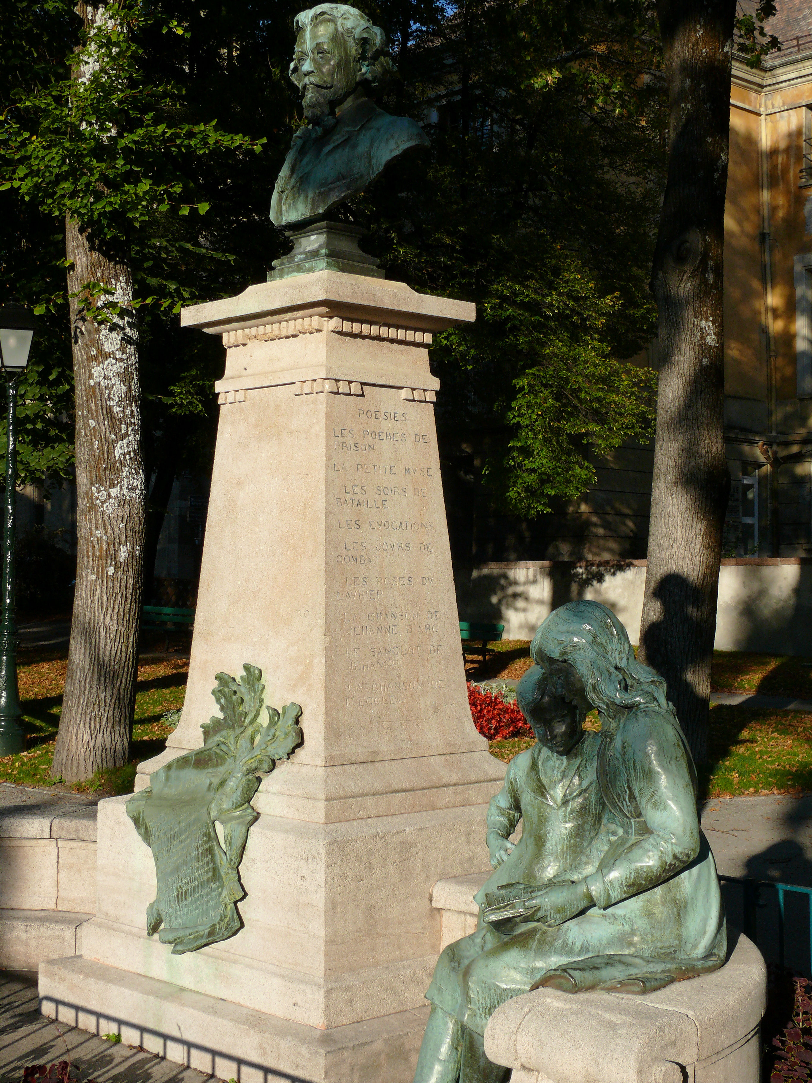 Embrun - Monument à Clovis Hugues dans le jardin de l'Archevêché